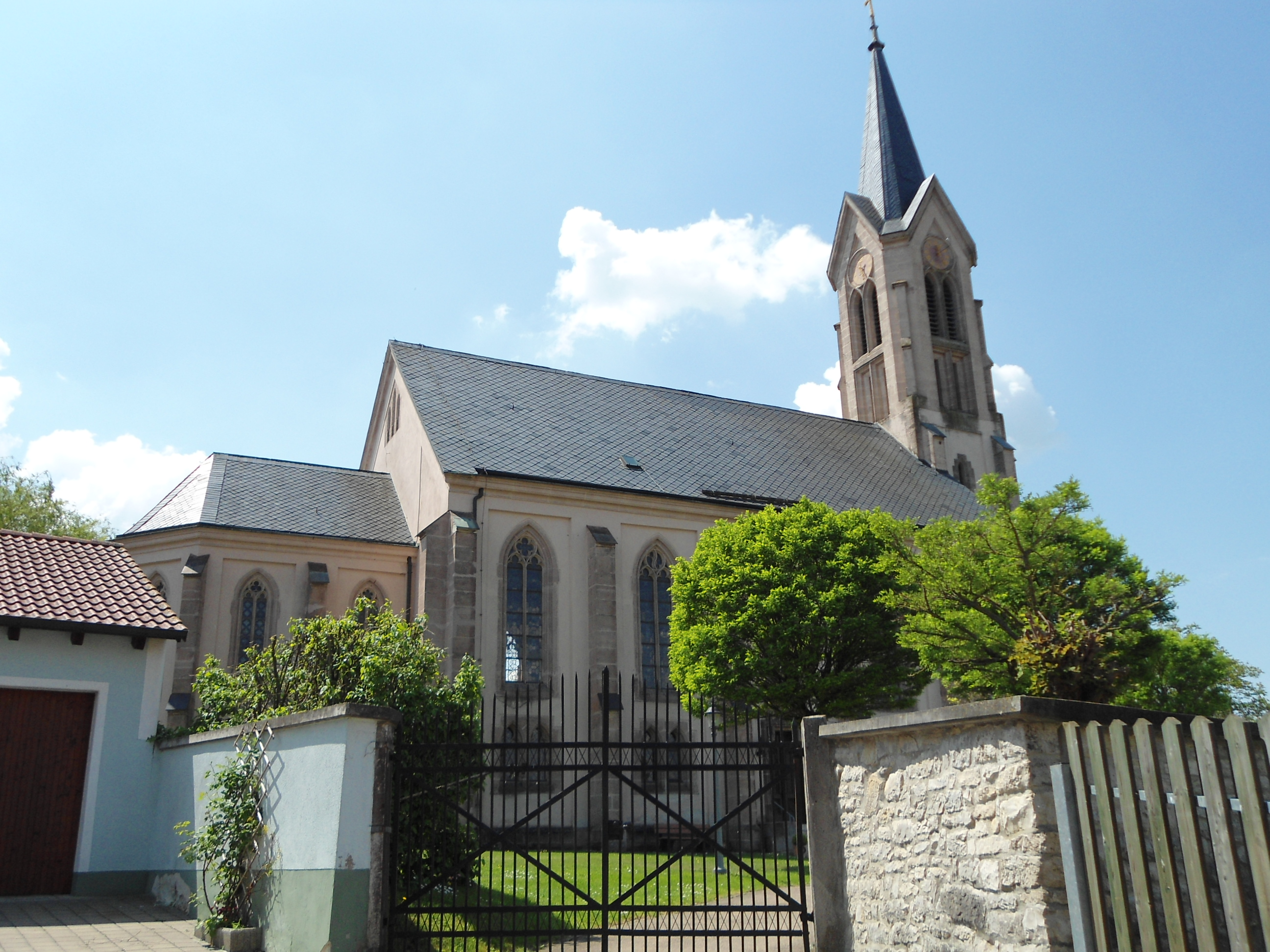 St. Urban